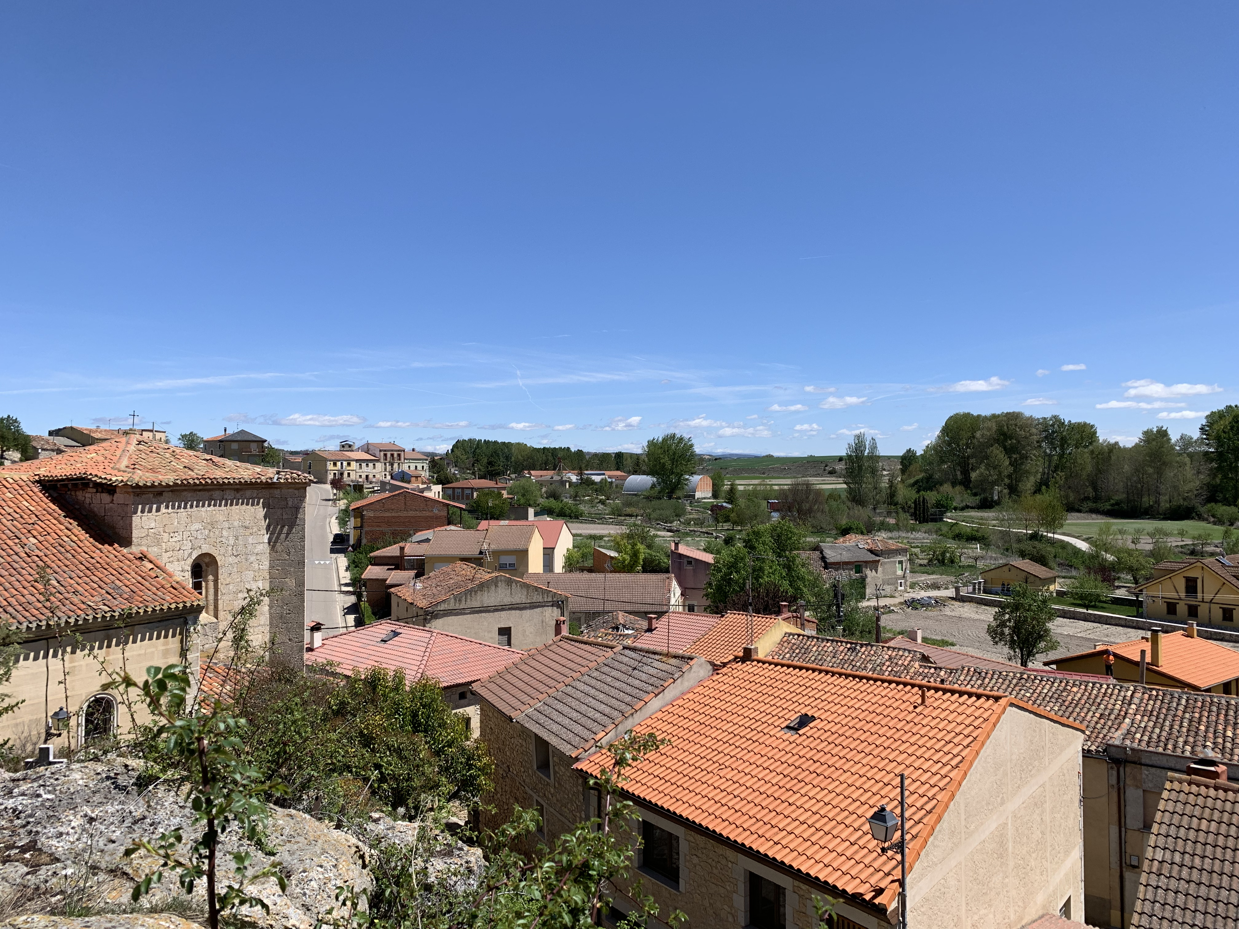 Tubilla del Lago